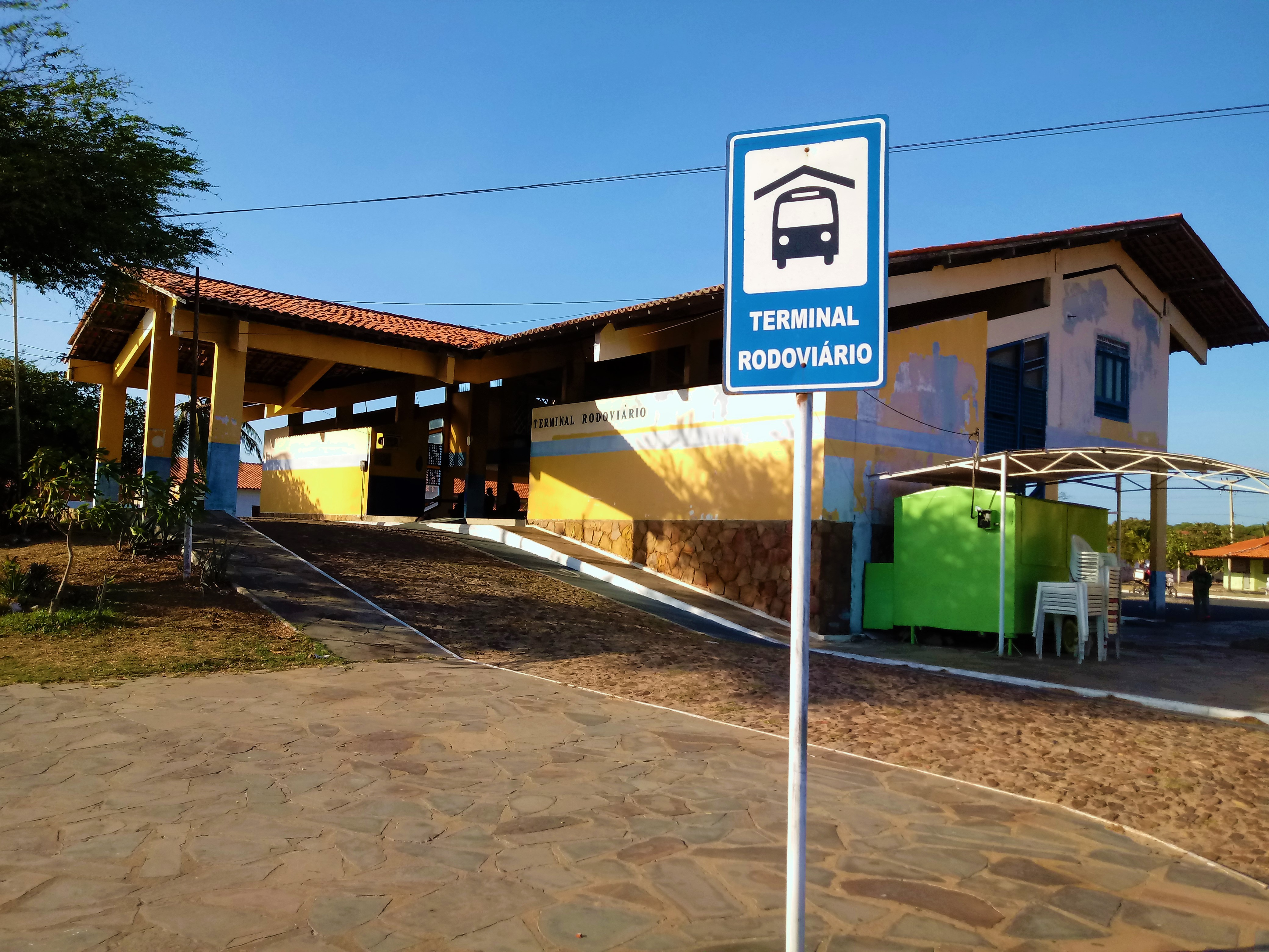 Rodoviário de Luís Correia (Piauí).